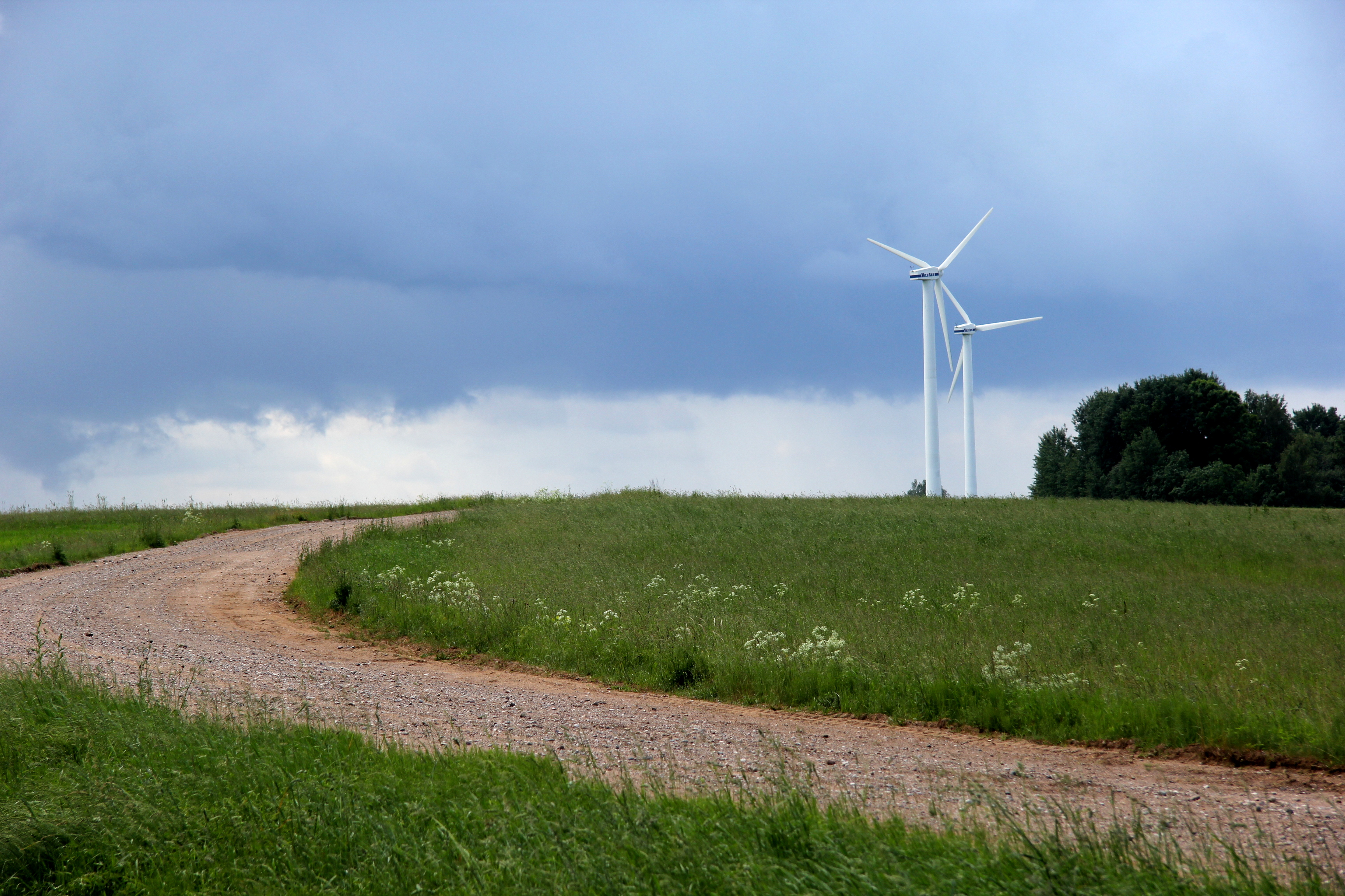 Vēja ģenerātori. Wind generators